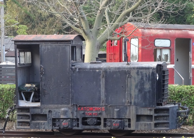 日本加藤鉄工所（株式会社加藤製作所の前身）製造